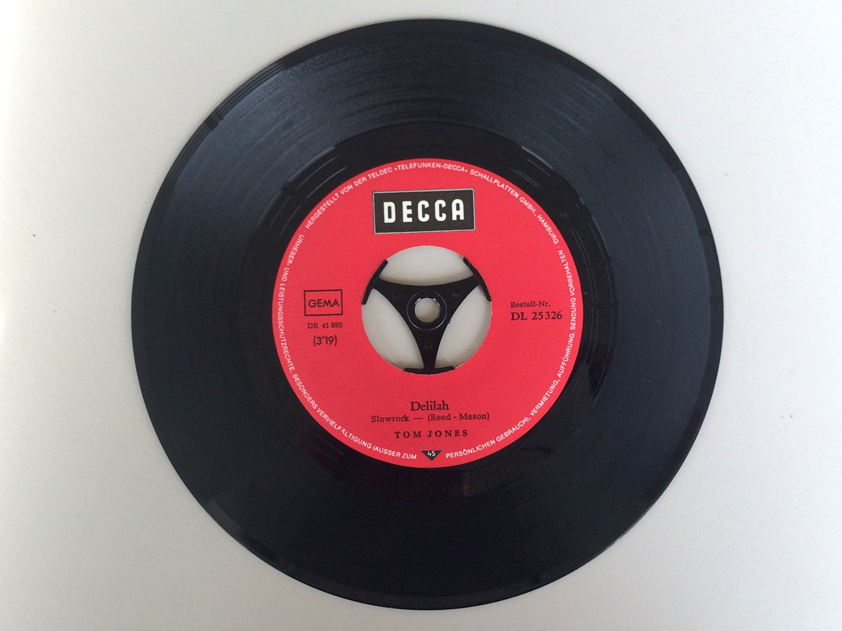 Single Delilah, Tom Jones 1968